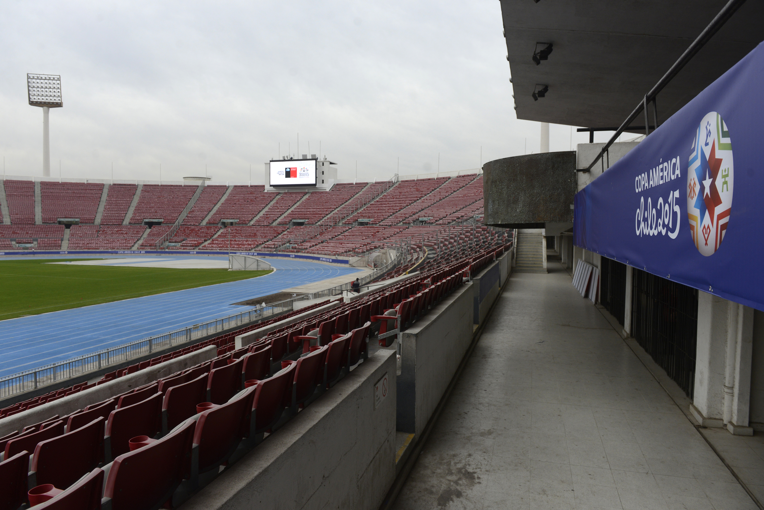 04 Junio 2015, Ministro Marcelo Díaz junto a la Ministra Riffo lanzan página web con información de la Copa America 2015.